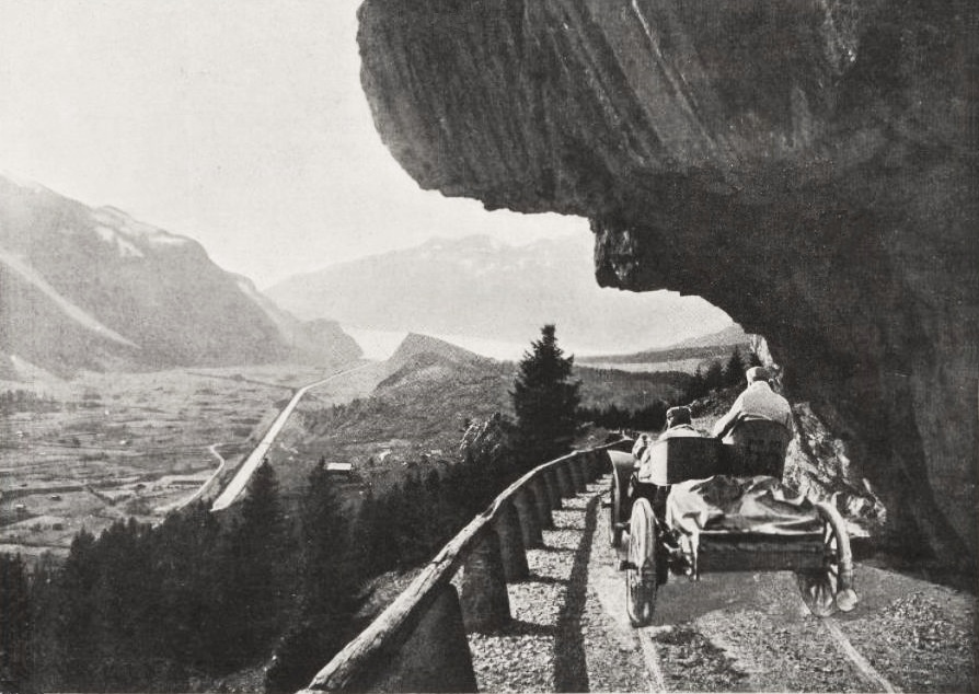 Gras sur de Dietrich dans l'Arlberg (Paris-Vienne 1902) - Le Sport universel illustré du 6 juillet 1902, p.427